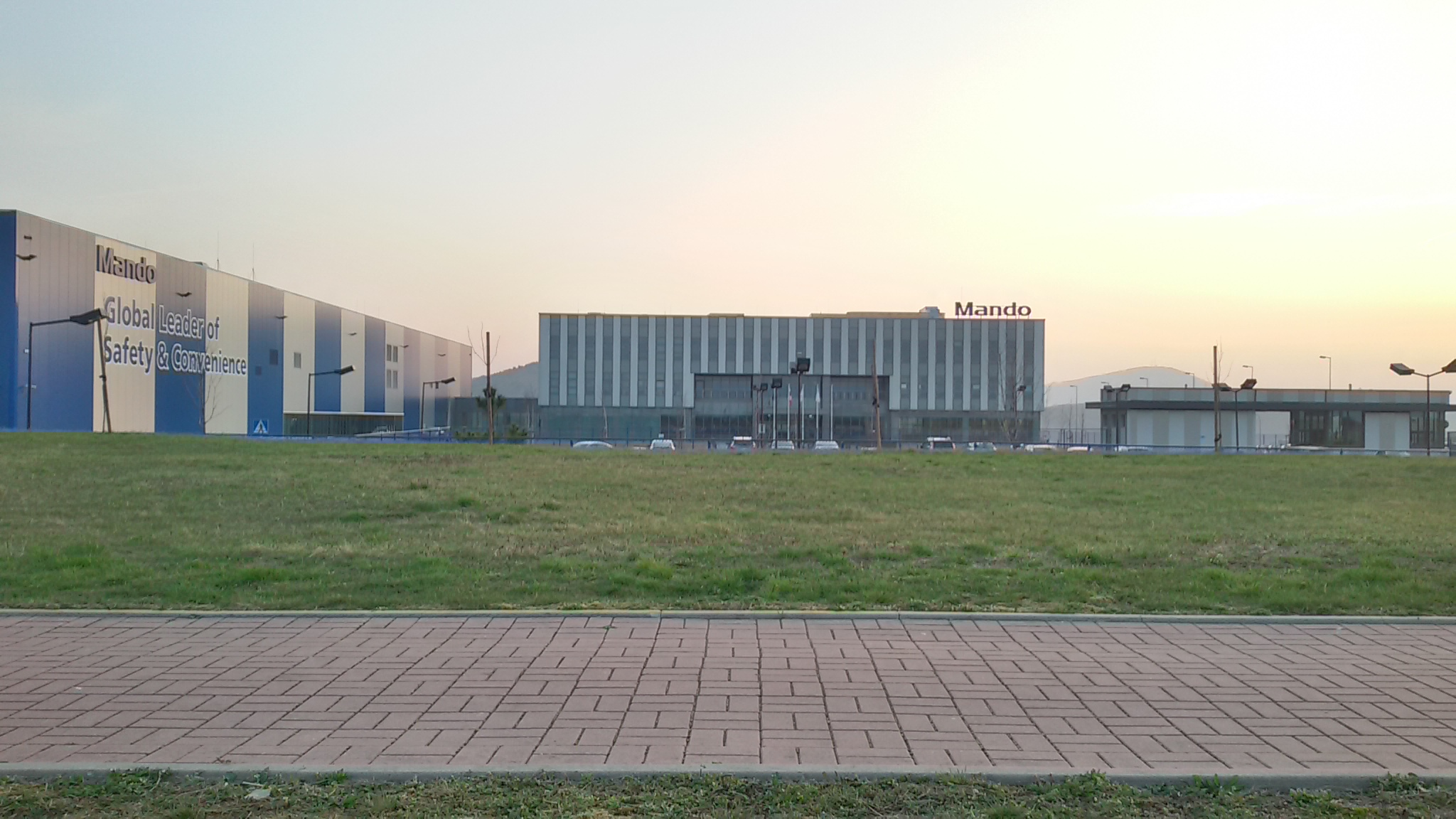 Zakład Mando WSSE